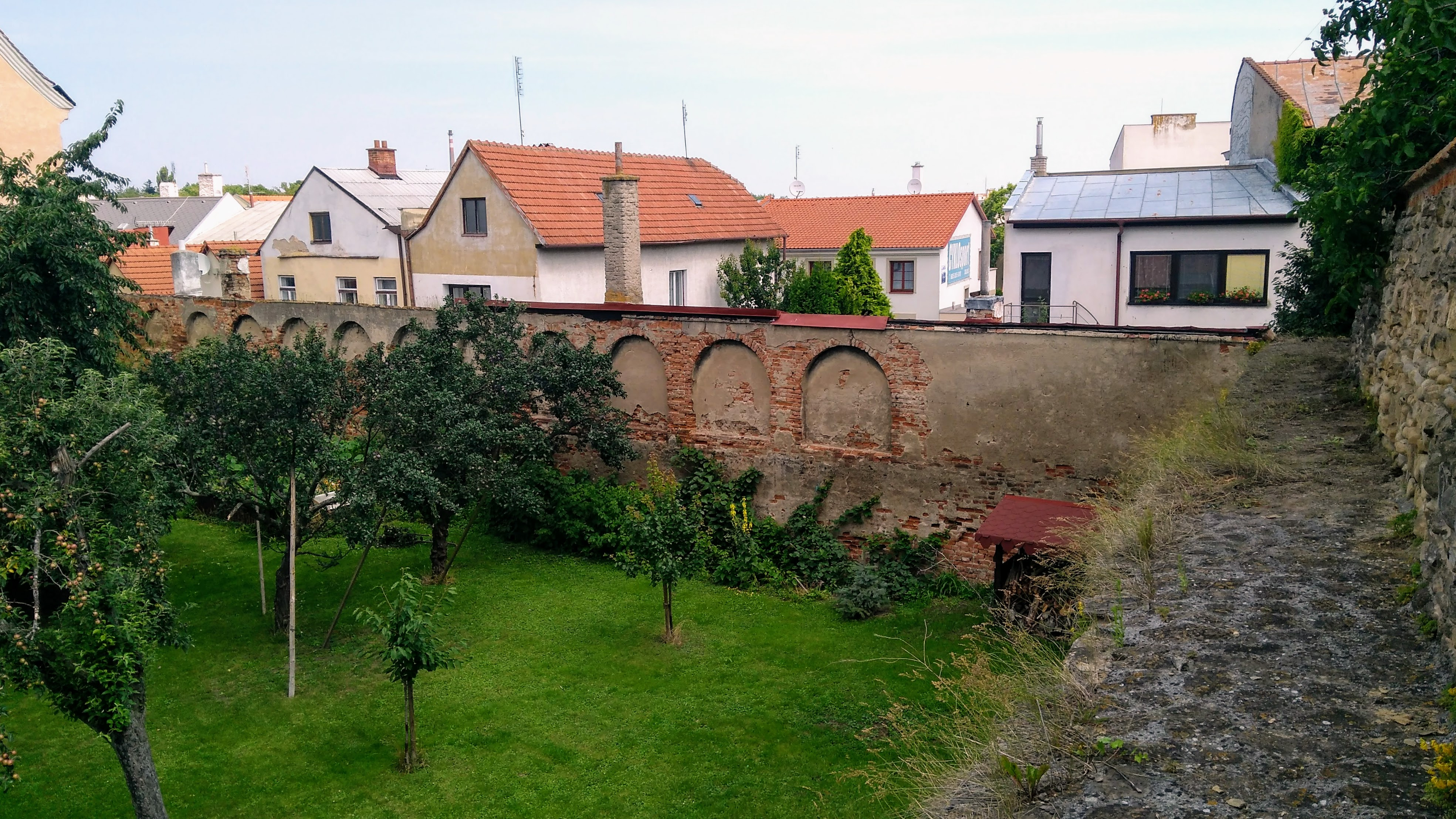 Kroměříž, Separační zeď - část ve Farní zahradě za emeritními domy na Riegrově náměstí